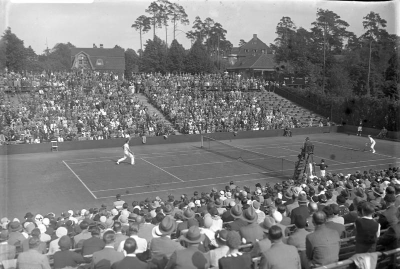 Deutschland und Irland im Kampf um den Davis-Pokal auf den Rot-Weiss-Tennisplätzen in Berlin ! Blick auf den Rot-Weiss-Tennisplatz während des Davispokal-Kampfes, vorn der Irländer [C. S.] Rogers.